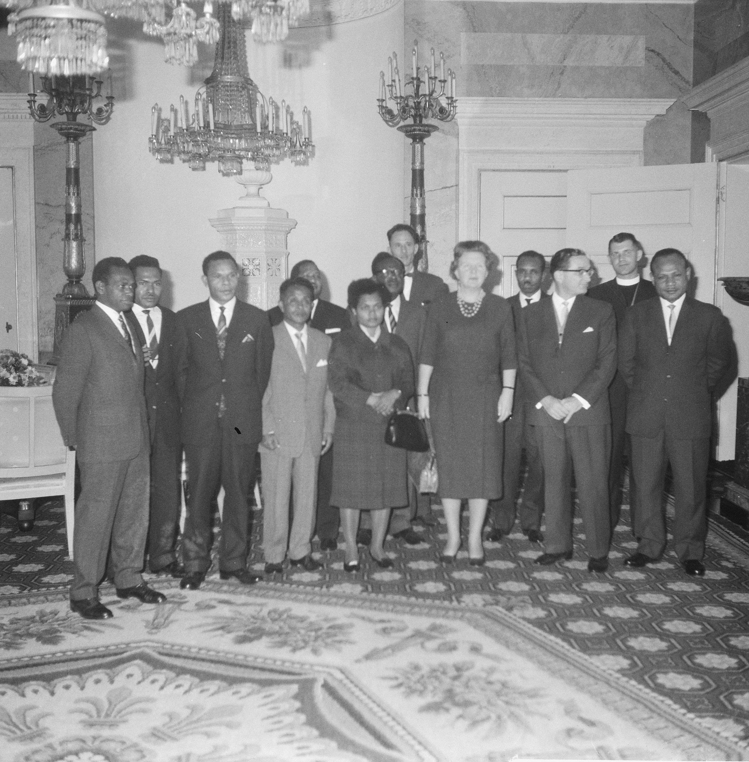 Collectie / Archief : Fotocollectie Anefo Reportage / Serie : [ onbekend ] Beschrijving : Leden van de delegatie van de Nieuw Guinea Raad op Soestdijk Datum : 14 december 1961 Trefwoorden : delegaties, leden Instellingsnaam : Nieuw-Guinea-Raad Fotograaf : Pot, Harry / Anefo Auteursrechthebbende : Nationaal Archief Materiaalsoort : Negatief (zwart/wit) Nummer archiefinventaris : bekijk toegang 2.24.01.03 Bestanddeelnummer : 913-2915